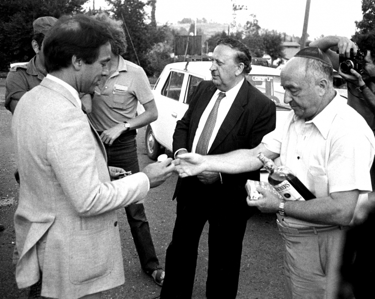 שמחה הולצברג והשר יעקב מרידור עם מנהיגי הנוצרים בלבנון. מימין לשמאל שמחה הולצברג "אבי הפצועים", השר יעקב מרידור, בשיר ג'מייל (במקטורן בהיר) - מנהיג הנוצרים.